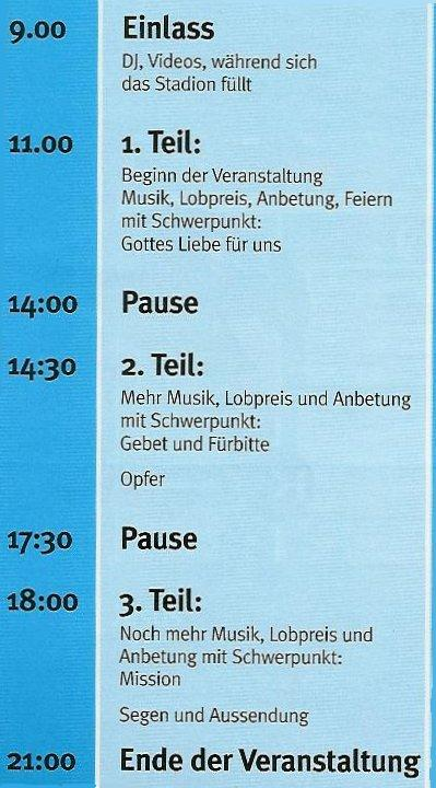 Zeitlicher Ablauf des christlichen Festivals Calling all Nations